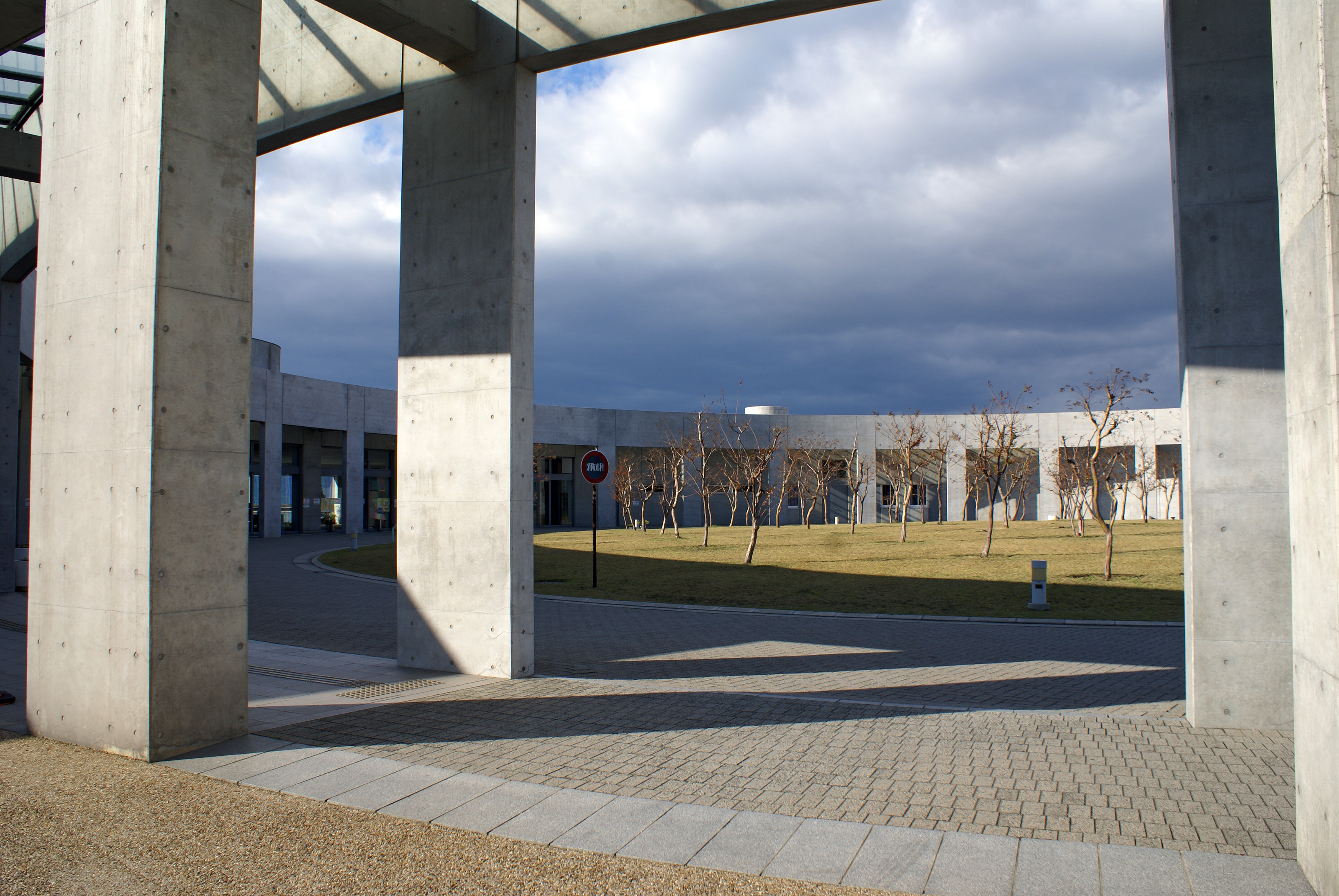 Osaka Maritime Museum in Osaka, Japan